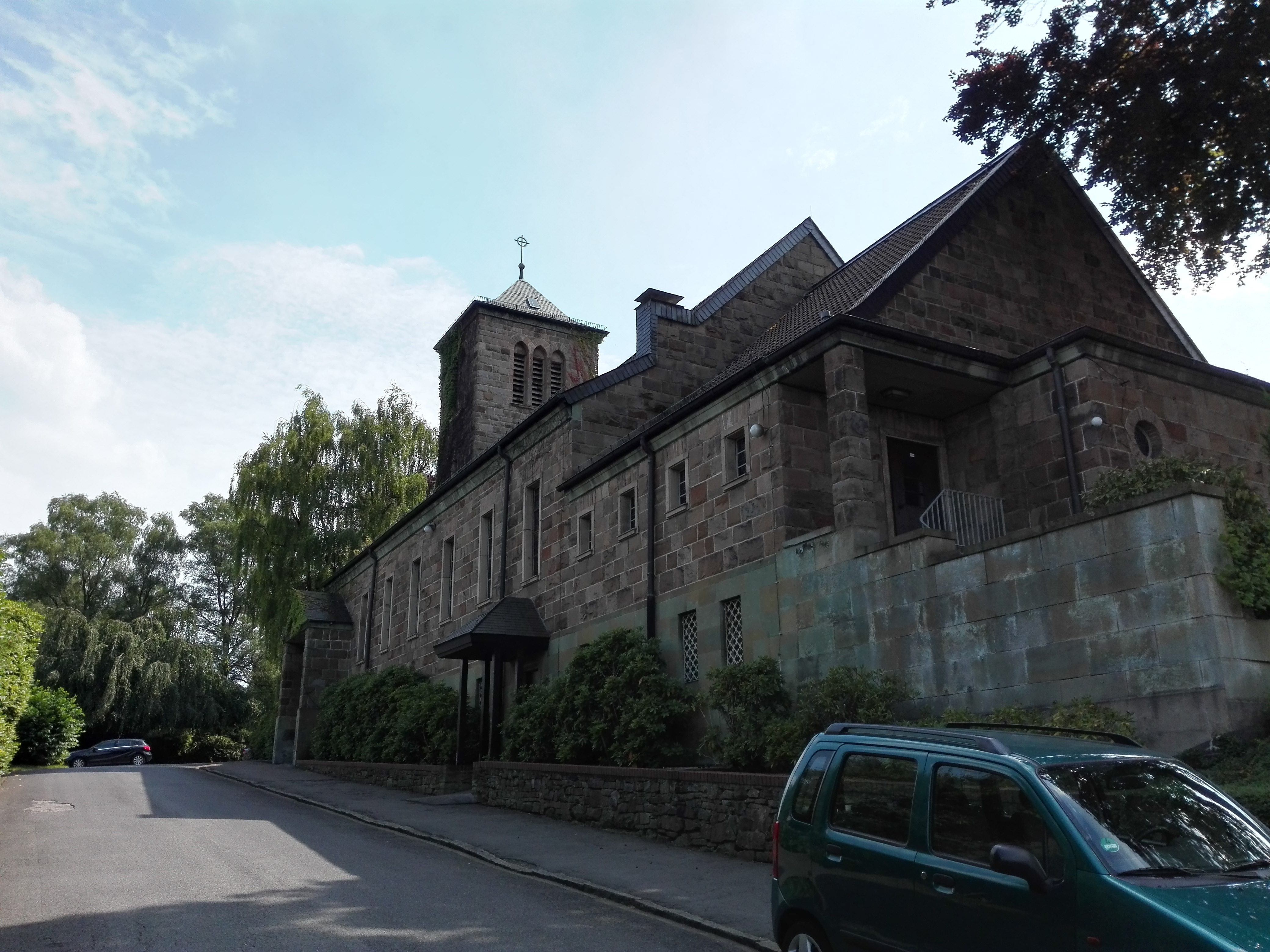 Auferstehungskirche am Friedhof Norrenberg in Wuppertal-Heckinghausen